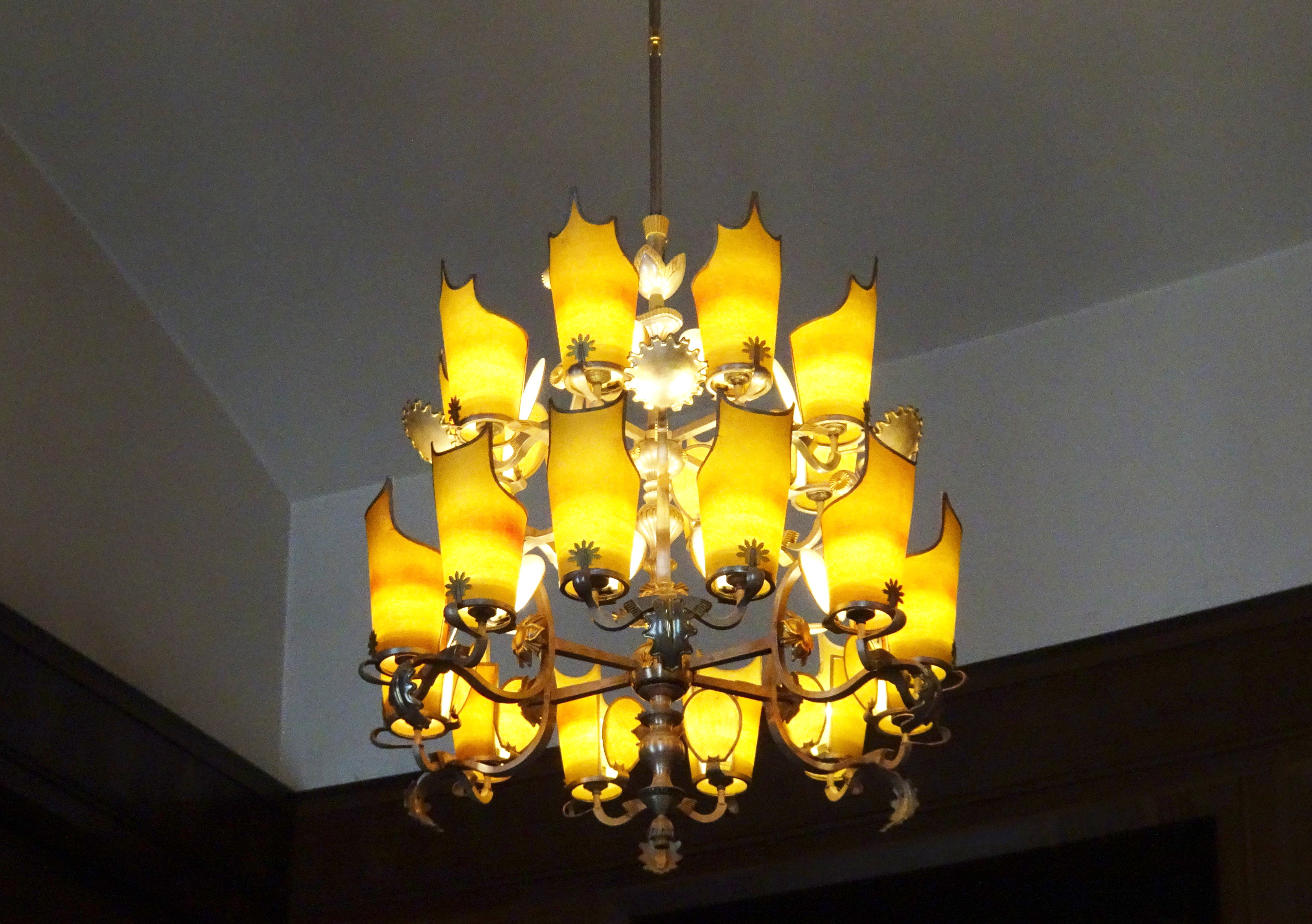 Tändstickspalatset Sessionssal, takarmatur, kom från Arvid Böhlmarks lampfabrik i Stockholm och ritades av Tengboms arkitektkontor, troligen av Robert Hult